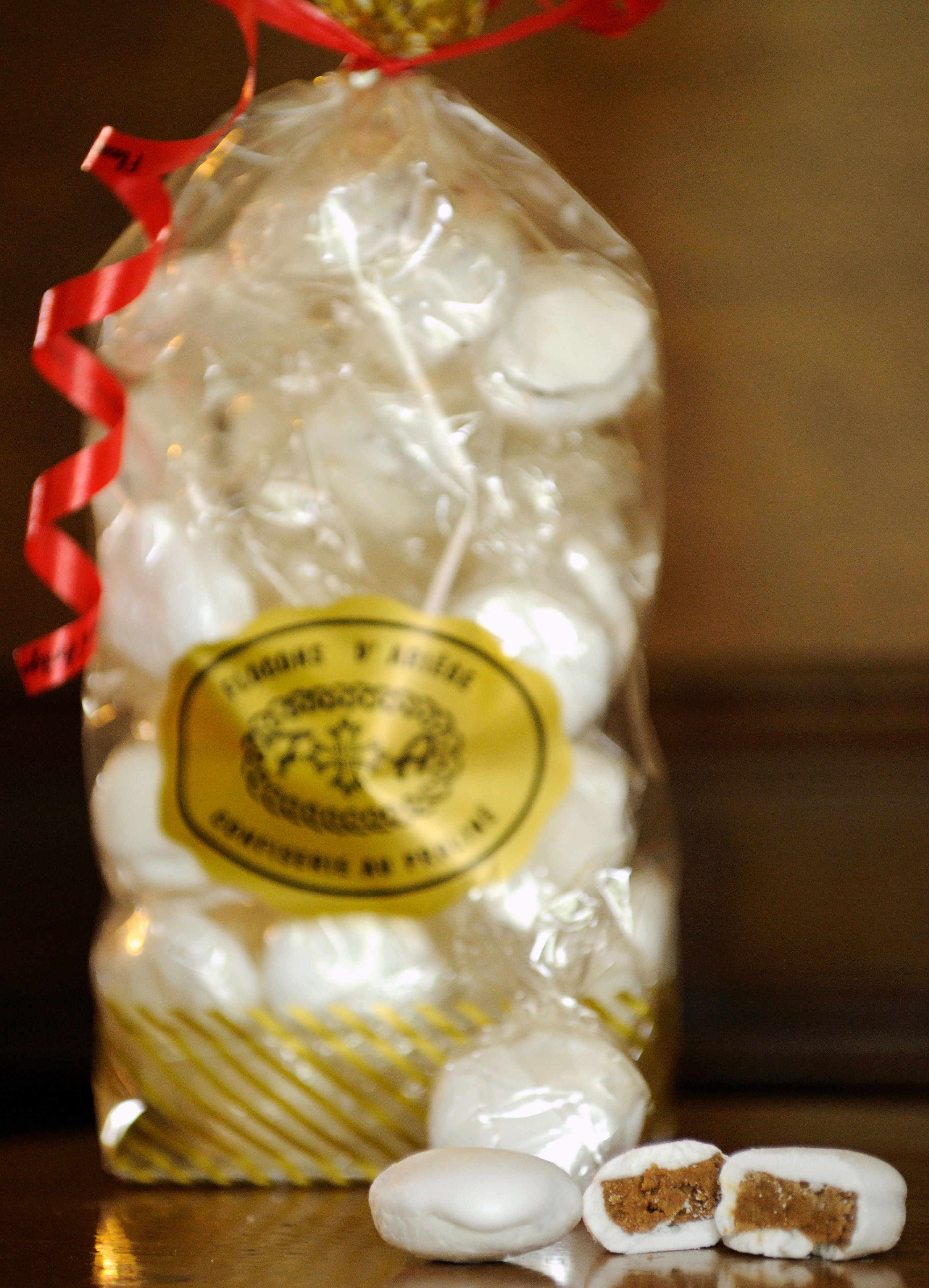 Flocons d'Ariège, spécialité ariégeoise fabriquée à La-Tour-du-Crieu. Meringue fourrée au praliné.